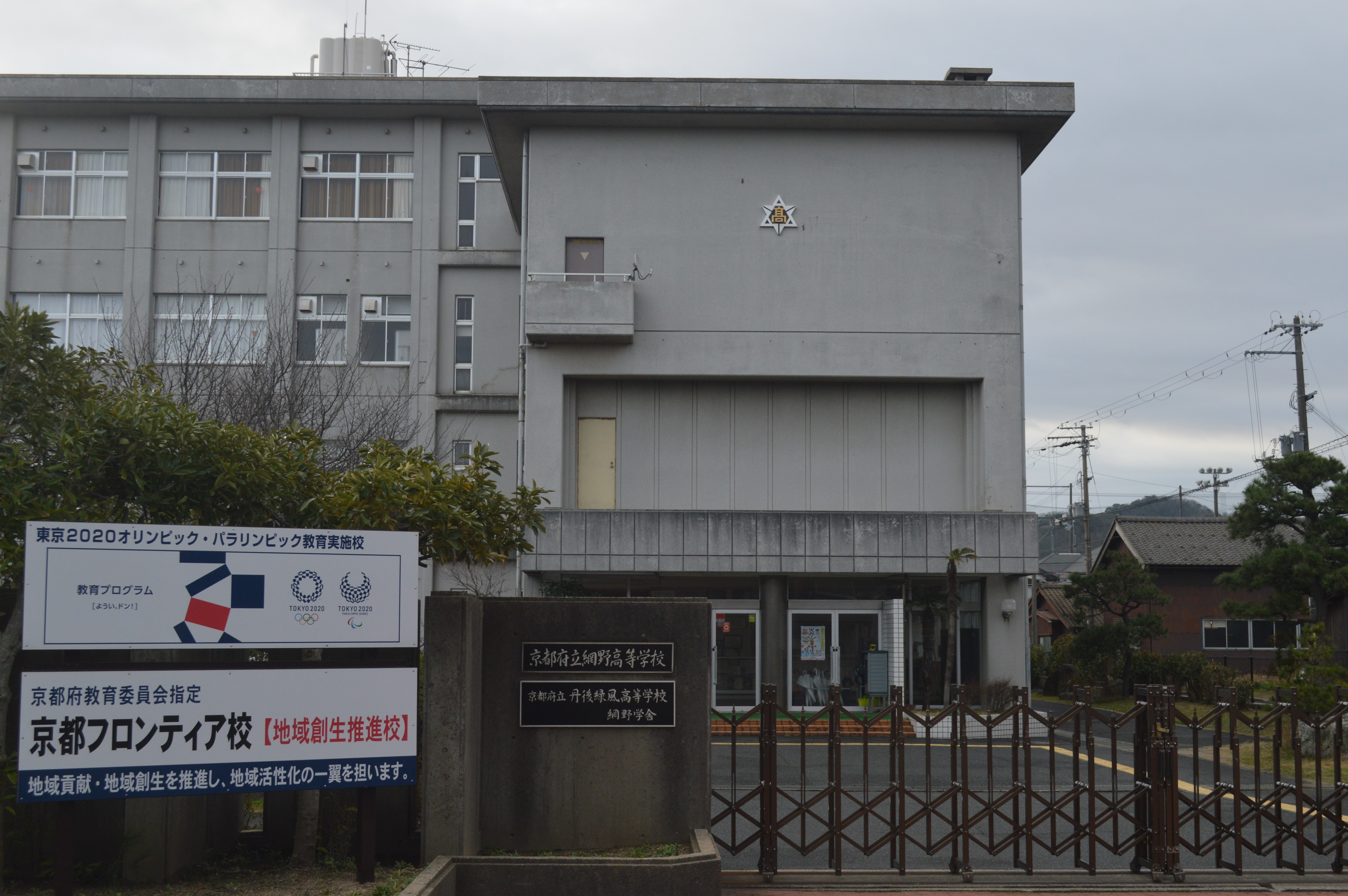 京都府立網野高等学校（京都府立網野高校）。2020年4月には京都府立丹後緑風高等学校（京都府立丹後緑風高校）となる予定。